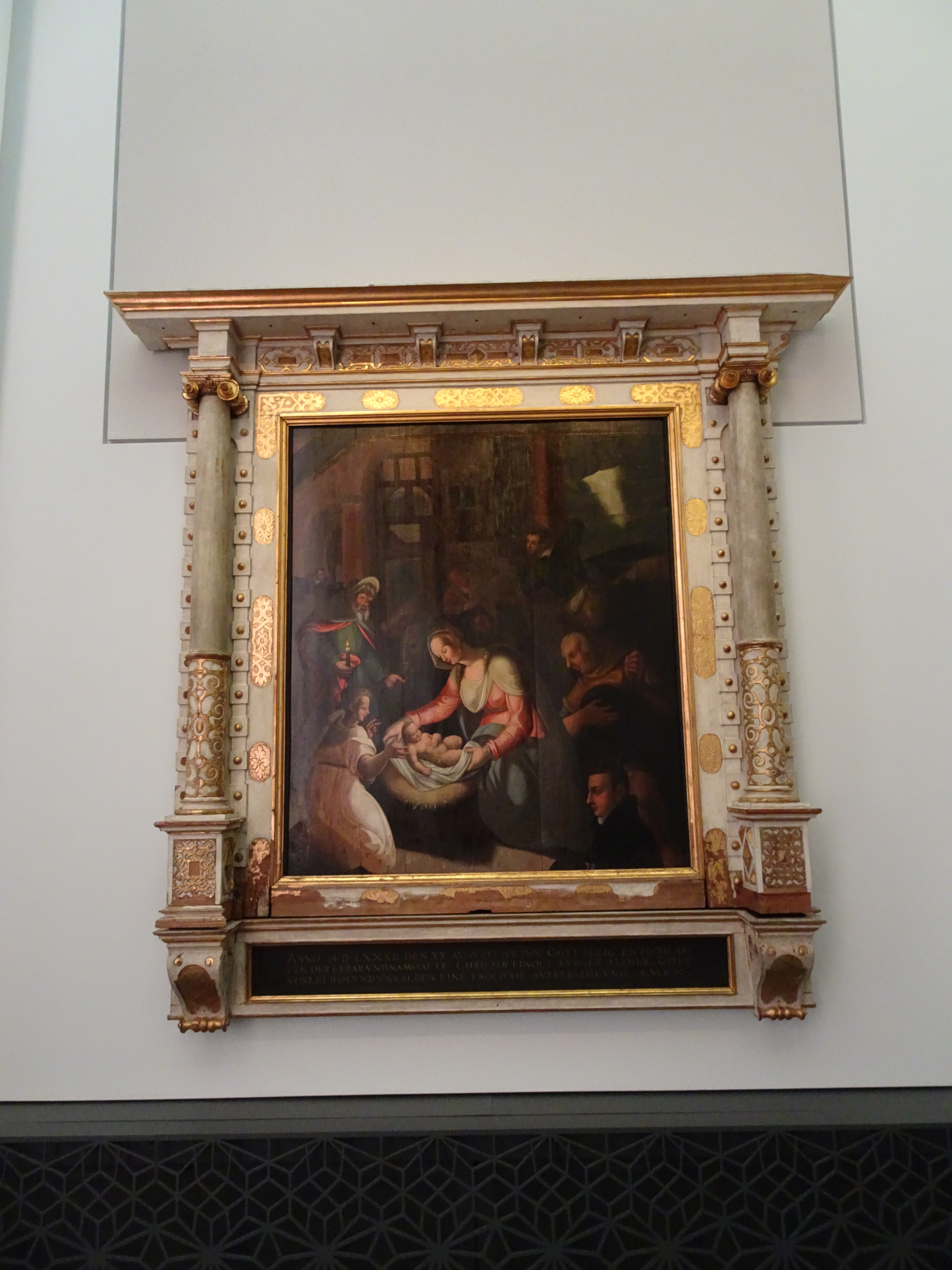 Epitaph des Kaufmanns Christoph Finolt in der Leipziger Universitätskirche